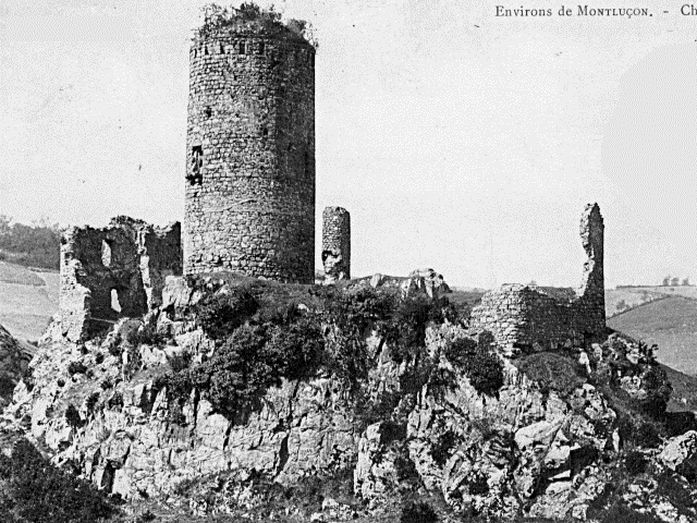 Le chateau de l'ours au début du XX siècle. La végétation est rase.